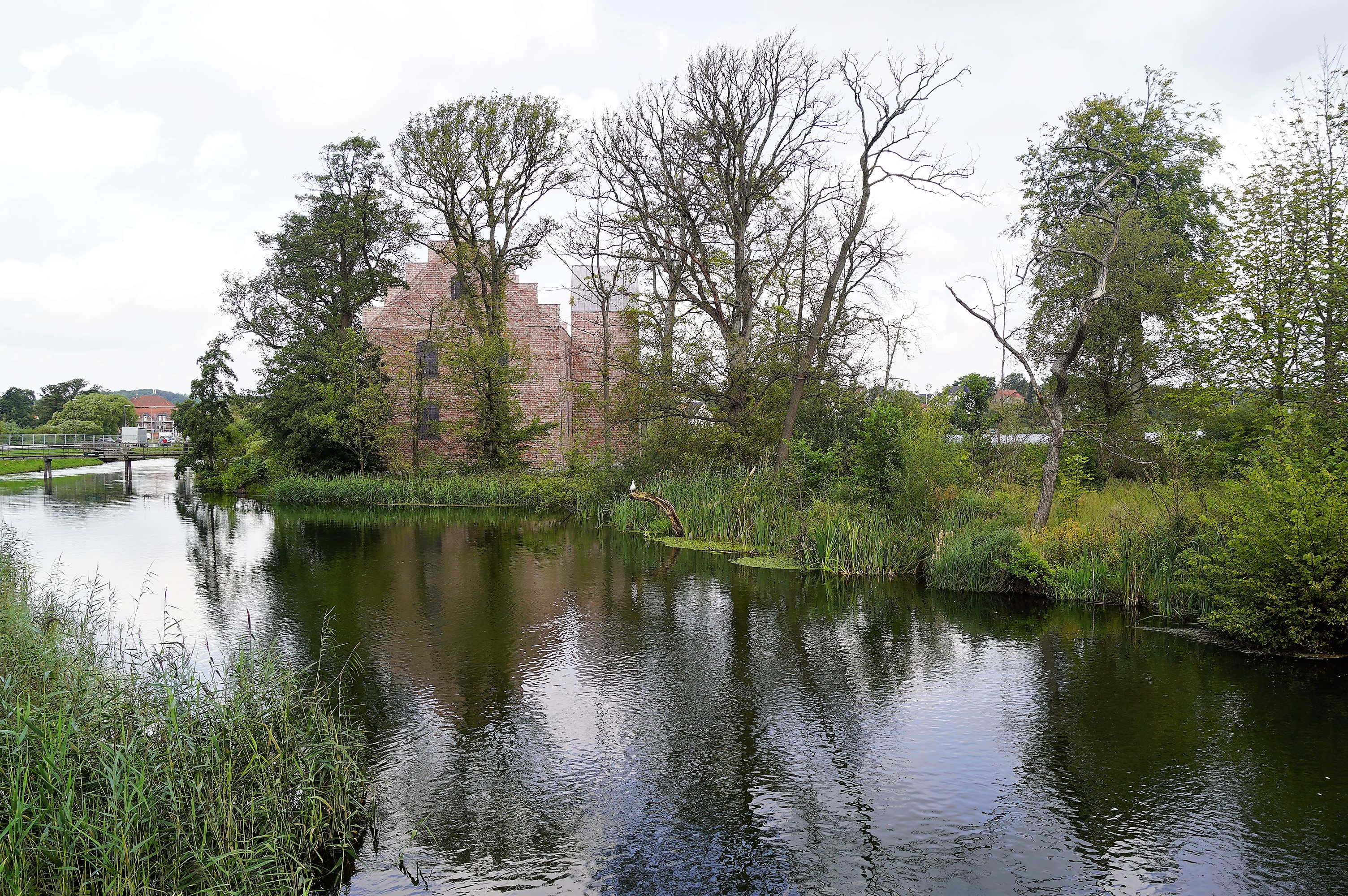 Visualisering af Silkeborg Slot 2017 set fra syd